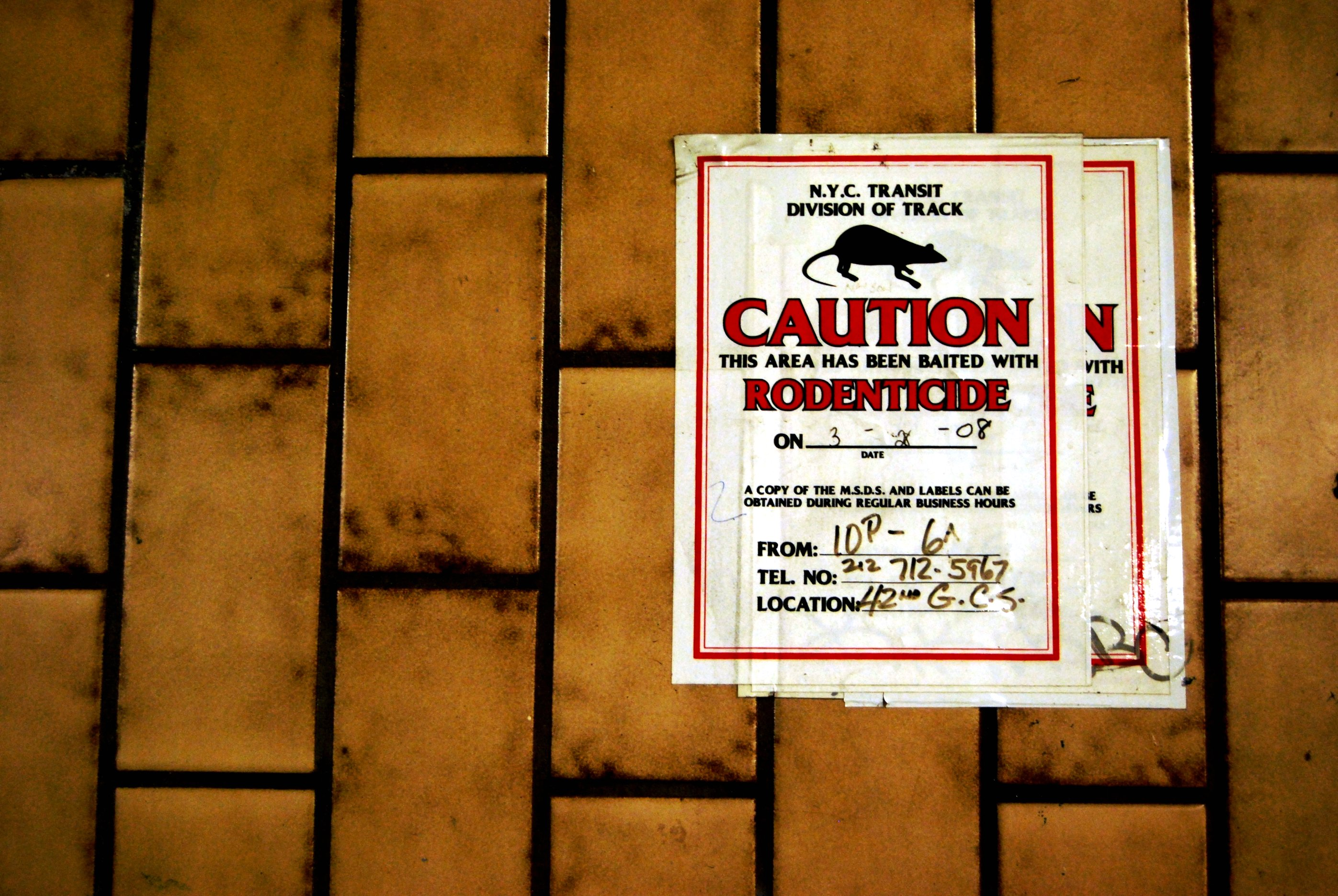 Rodenticide